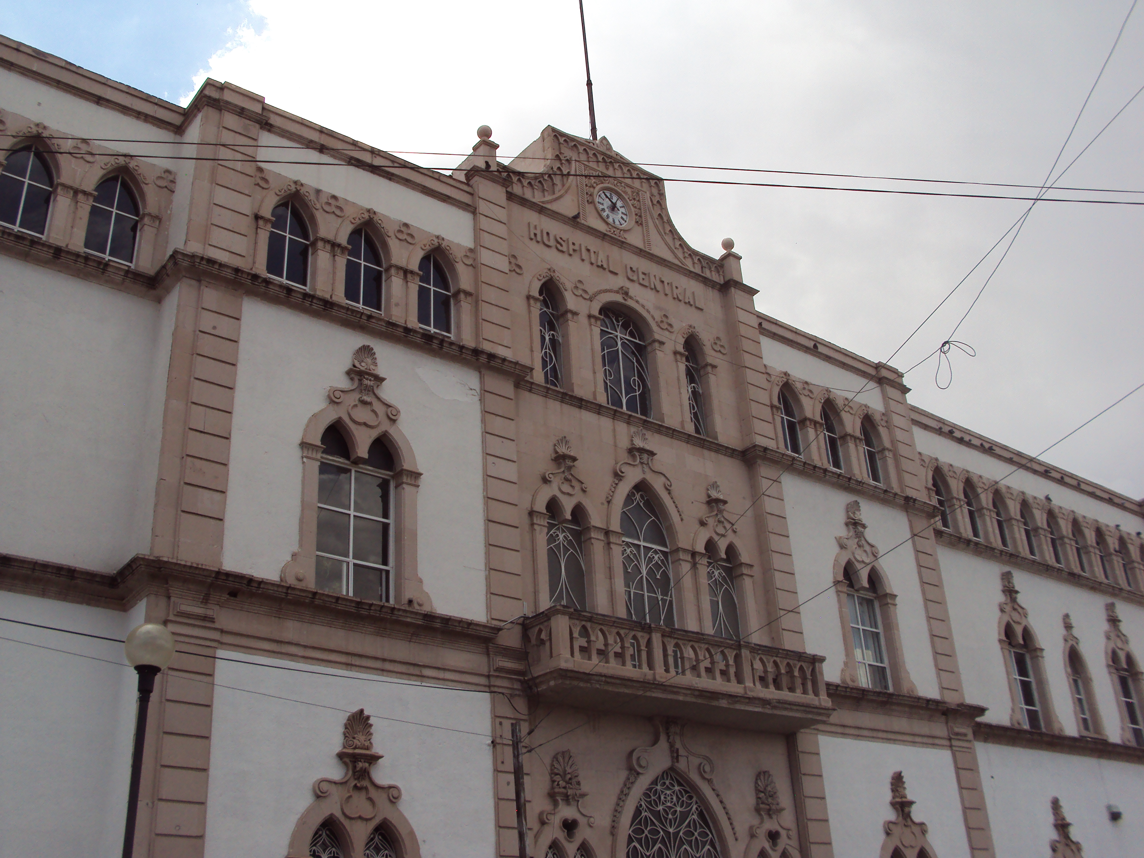 Fachada del Hospital Central Universitario, antiguo Hospital Porfirio Díaz, en Chihuahua, Chihuahua.